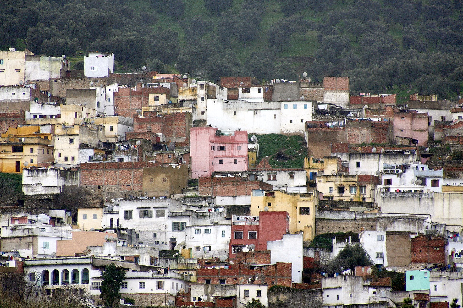 Dans le Rif, Maroc